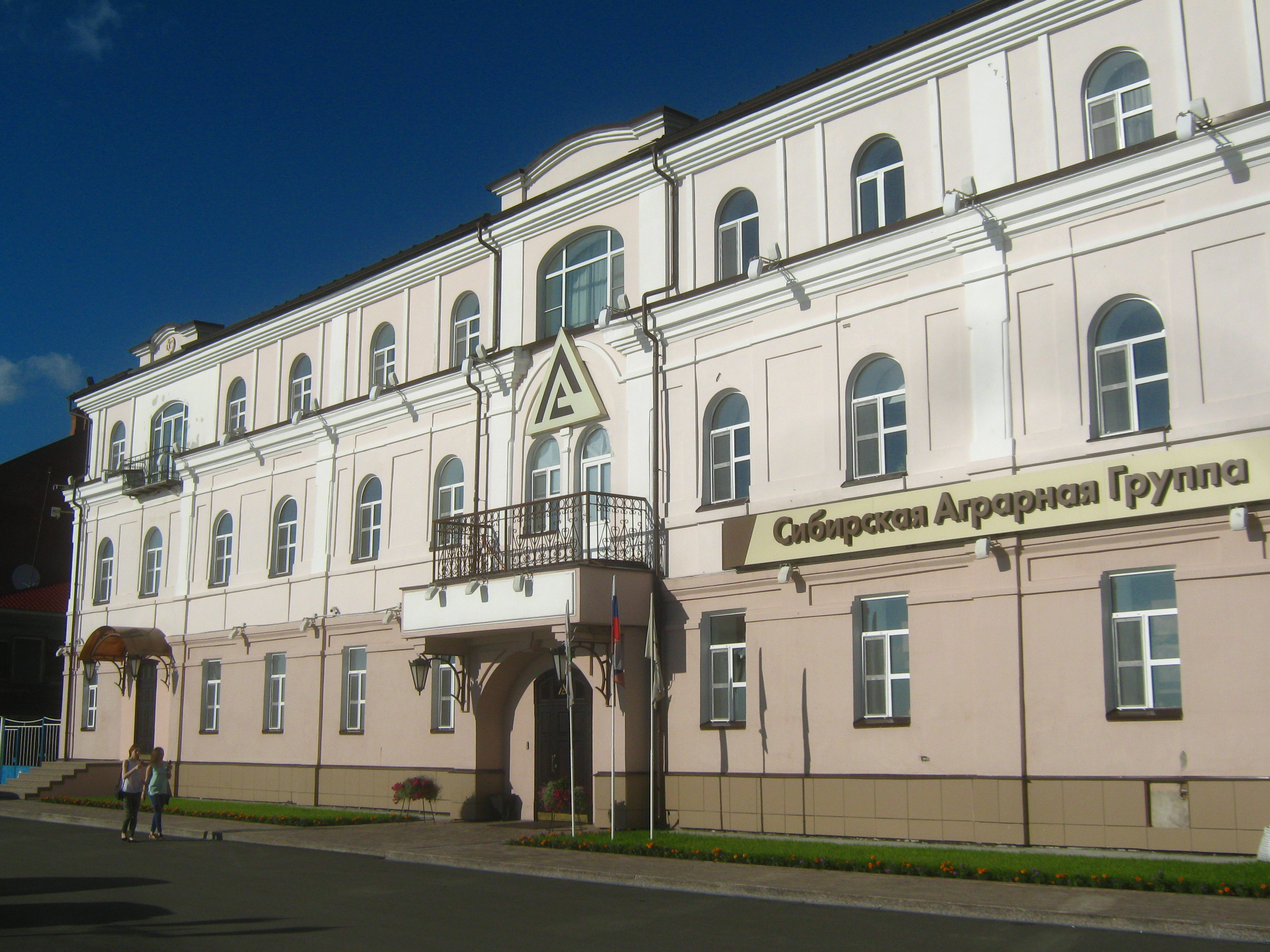 Набережная Томи 17 - Кооперативный 2